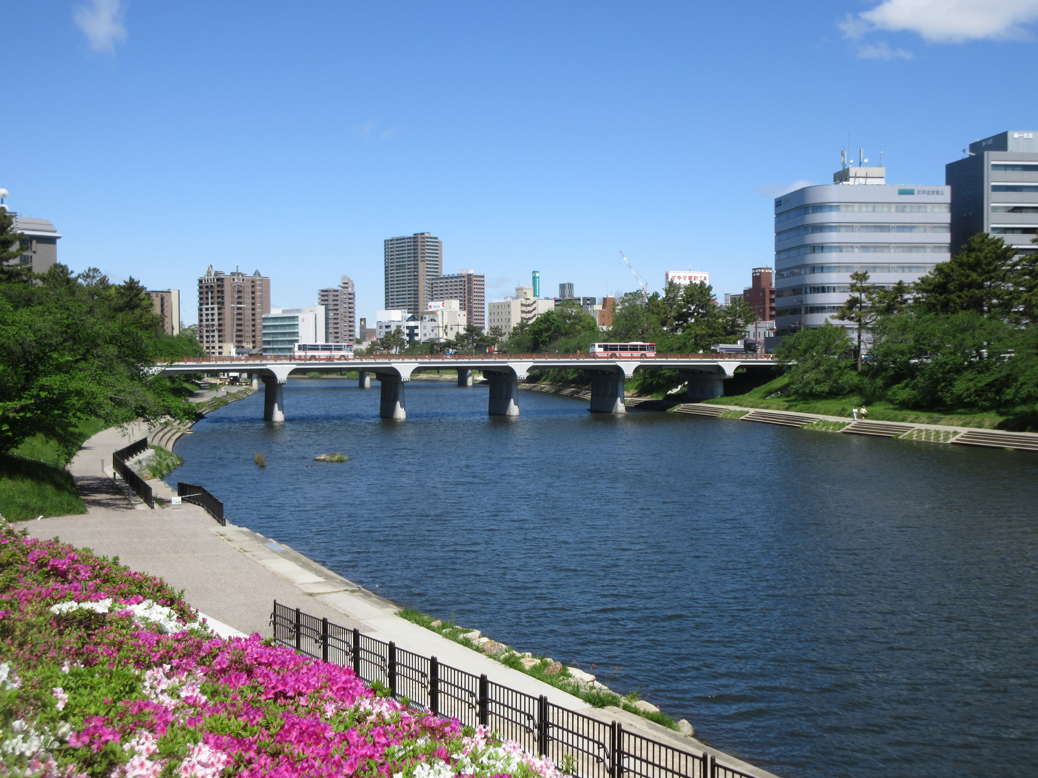 明代橋、乙川（愛知県岡崎市）